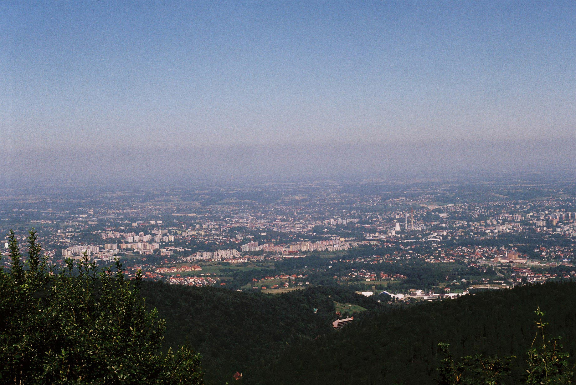 Bielsko-Biała, Poland, view of the city from Szyndzielnia. Bielsko-Biała, widok miasta z Szyndzielni. Author: Pko Date: 2 Sep 2005